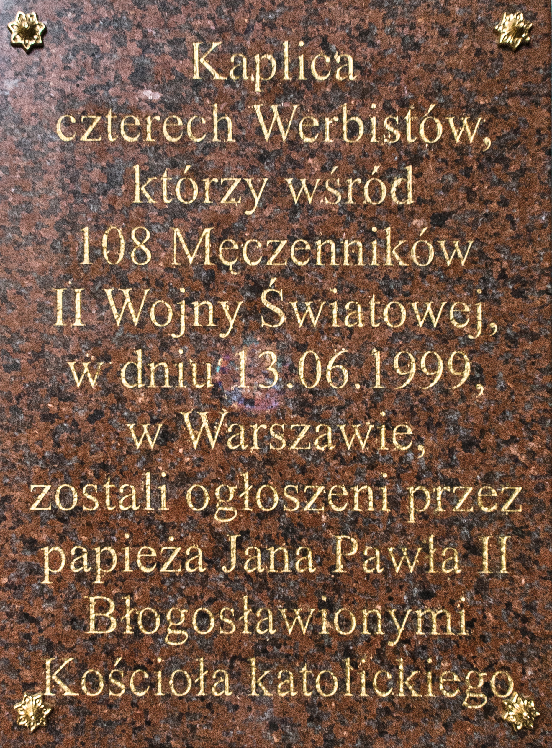 Kaplica Czterech Werbistów – tablica informacyjna. Klasztor Werbistów w Pieniężnie.